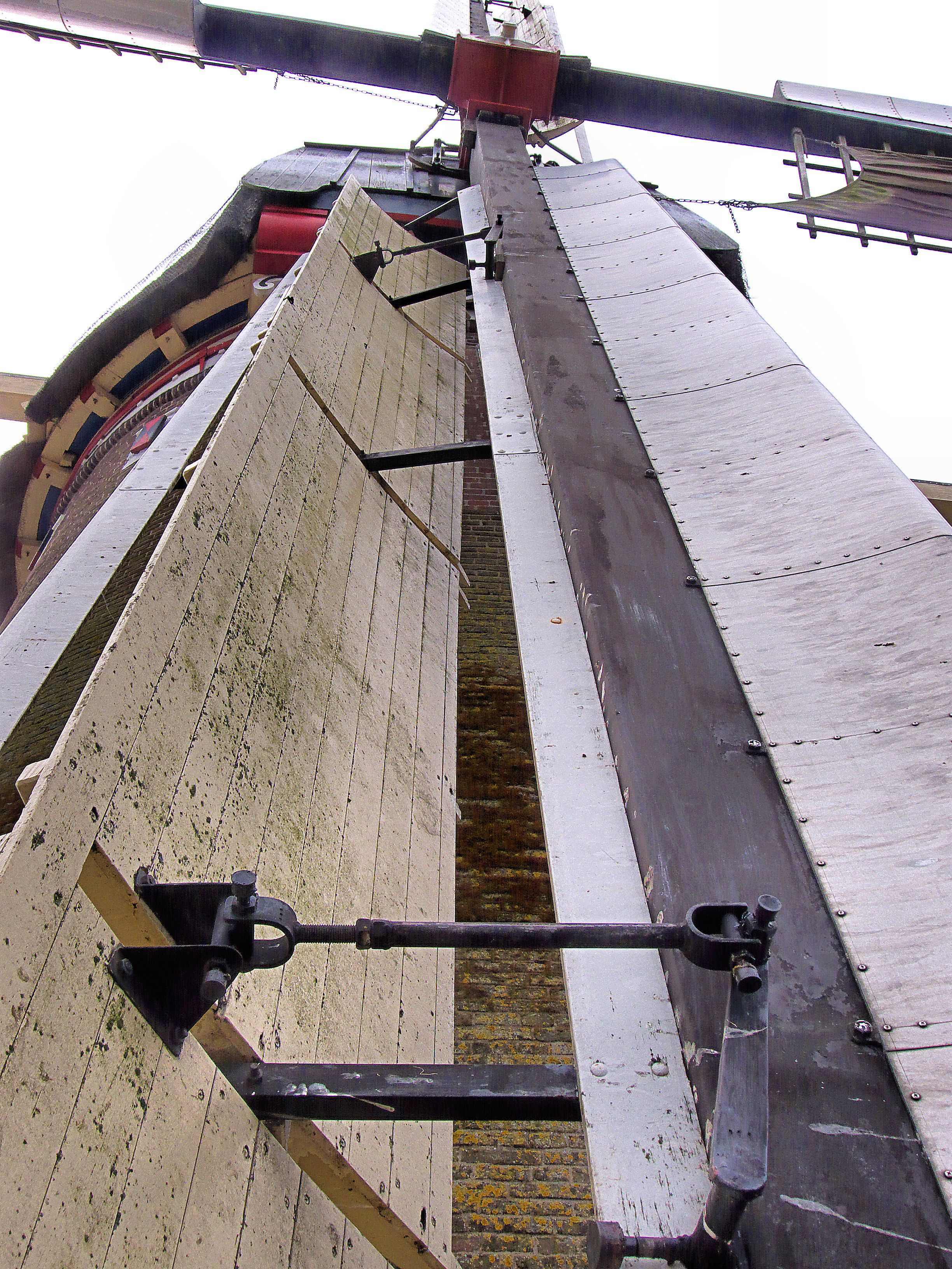 Wilpermolen, gevlucht met zwichtring, Ten Have kleppen en Busselneuzen